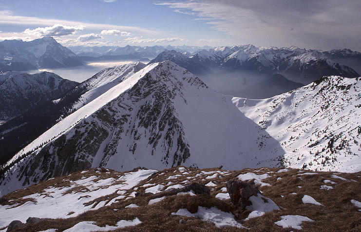 Bischof (2033 m) vom Krottenkopf (2086 m), Estergebirge, selbst fotografiert, GNU-FDL